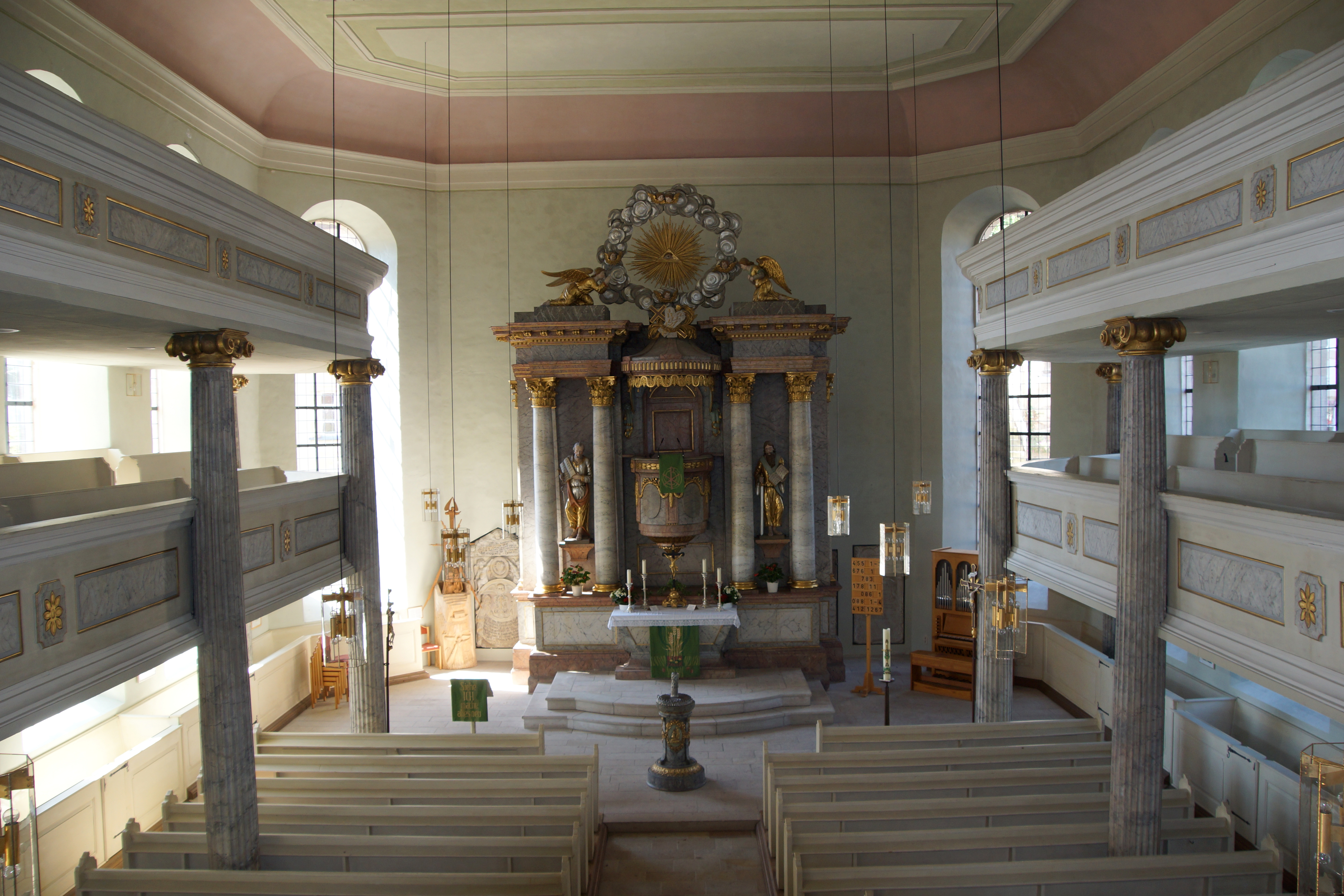 Die evangelische Dreifaltigkeitskirche in Bad Berneck im Fichtelgebirge